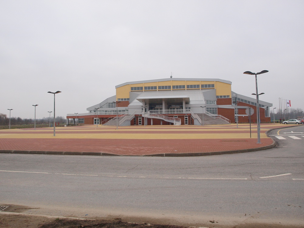 Sportska dvorana "Vijuš" u Slavonskom Brodu.